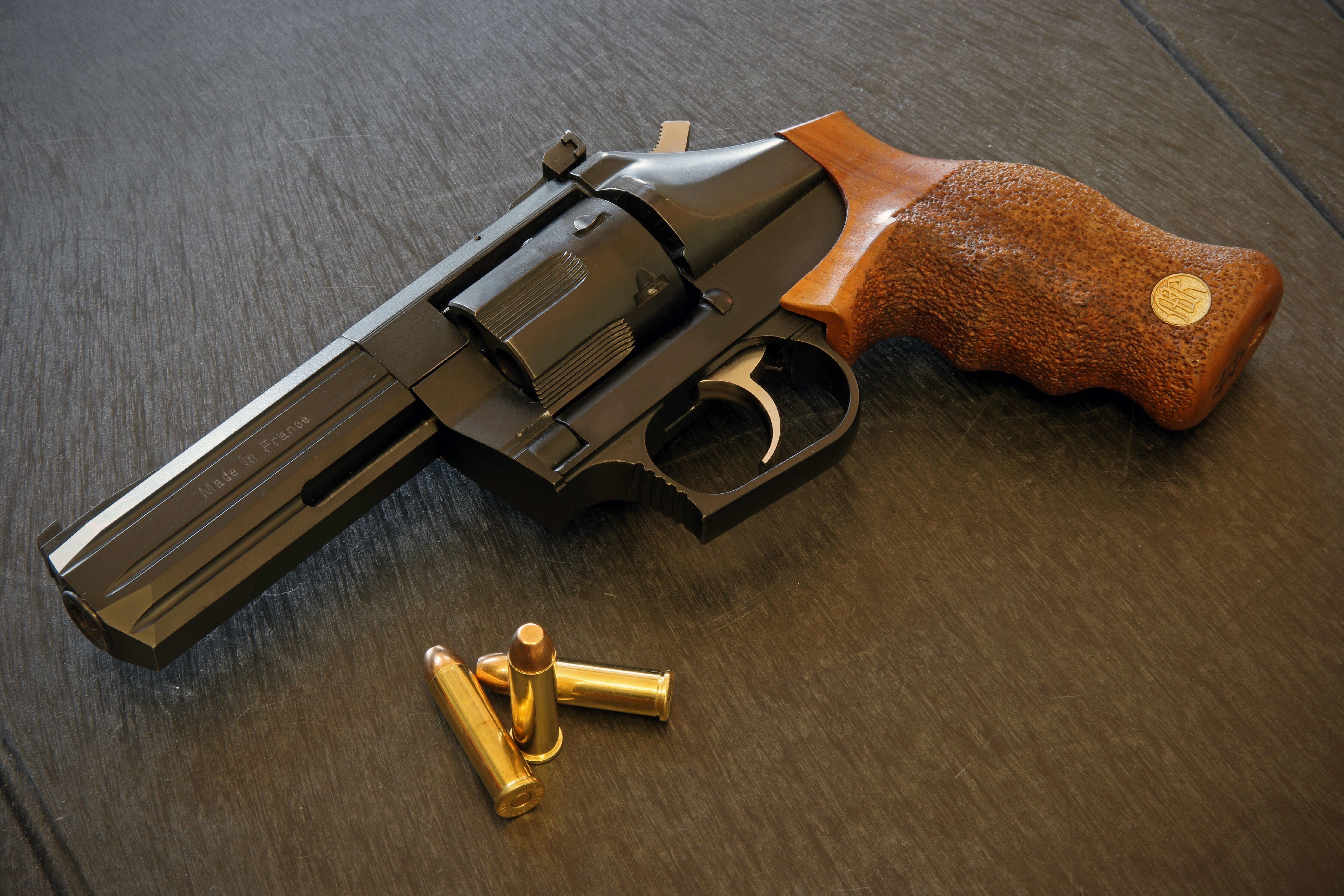 Manurhin MR93 357 Magnum